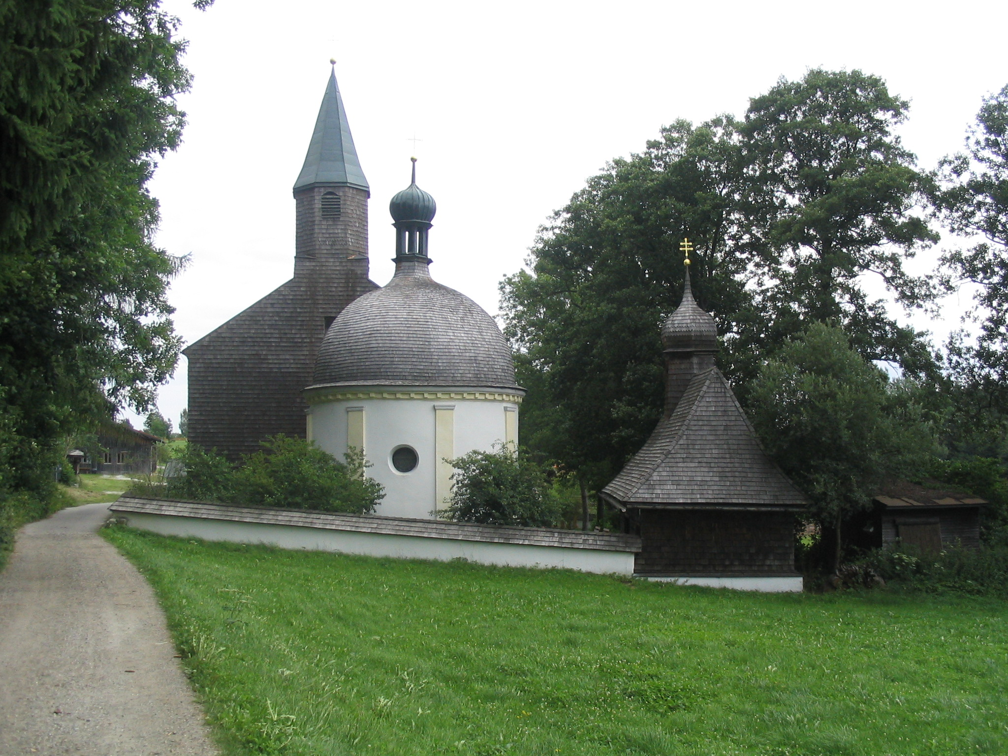 Bischofsmais, Sankt Hermann 3. Wallfahrtskirche St. Bartholomäus (links), Brunnenkapelle (mittig), Kapelle (rechts)